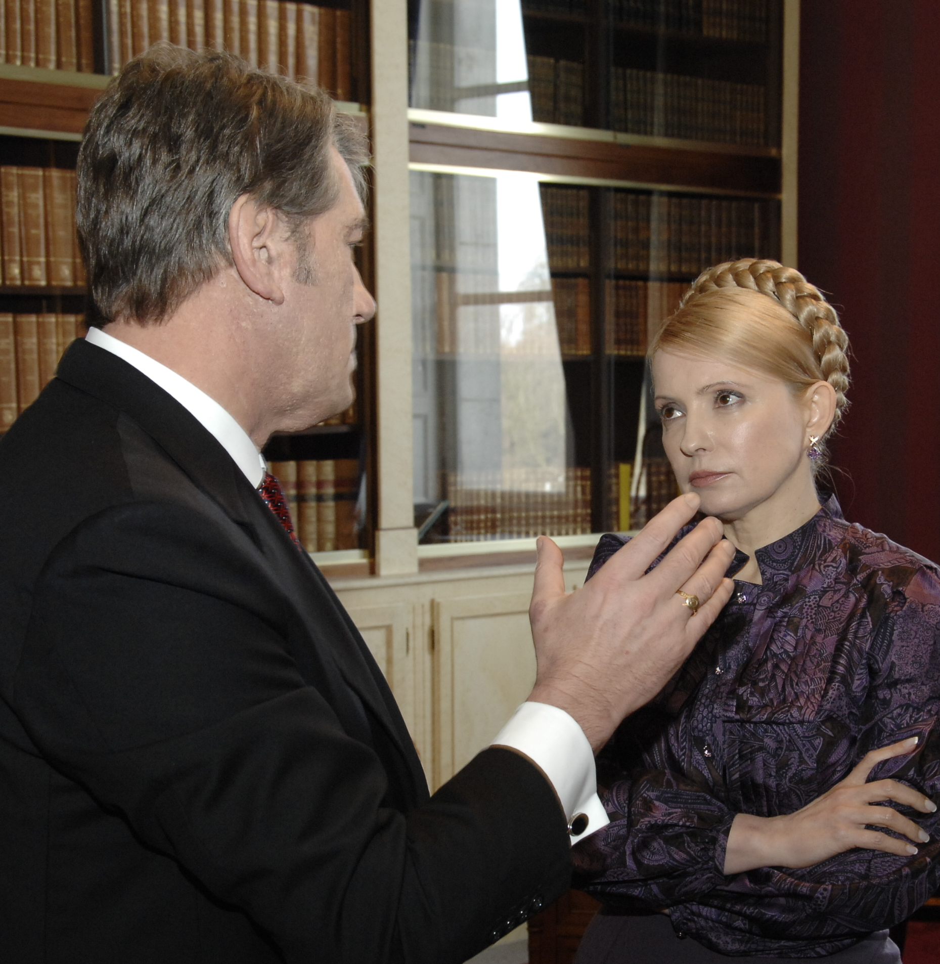 EPP Summit 19 March 2009